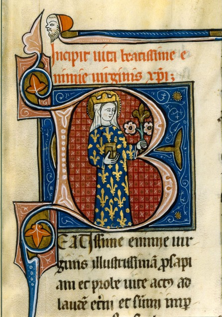 Office et vie de sainte Enimie. - Languedoc (Mende ?) : Initiale B historiée : sainte Enimie